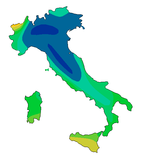 Carta della radiazione solare globale in Italia in marzo 18 MJ/mq